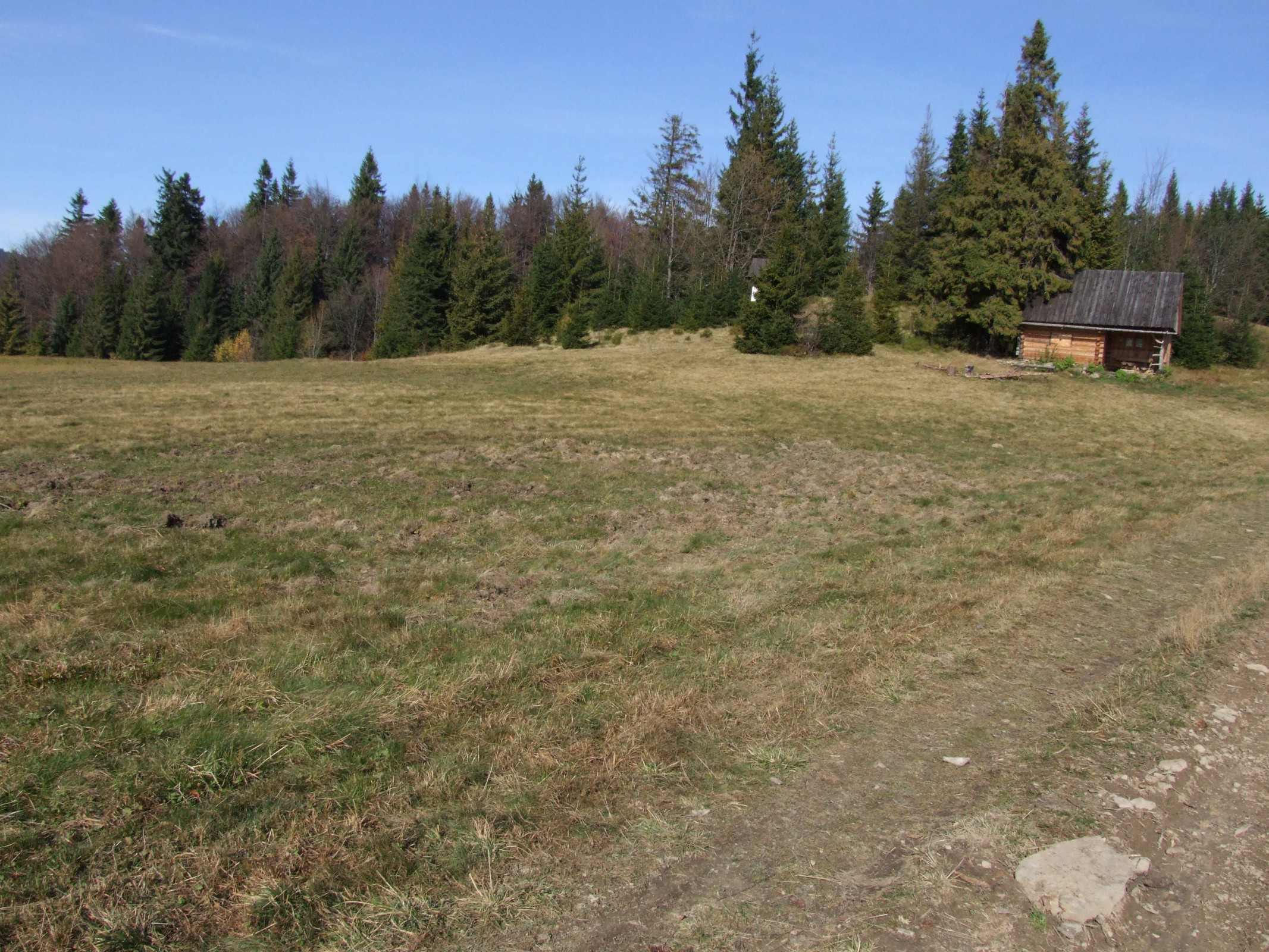 Polana Jankówki w Gorcach